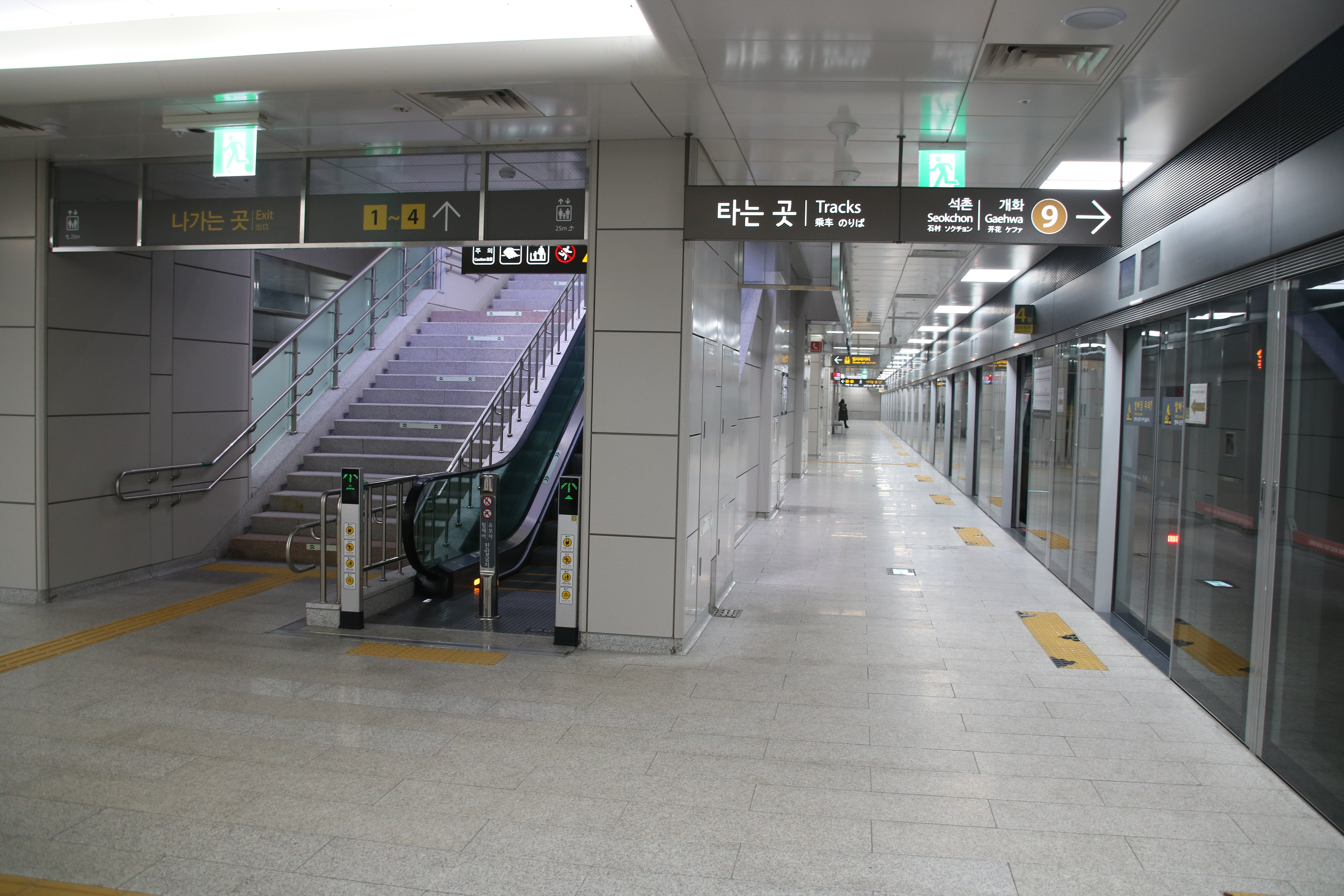 송파나루역 승강장